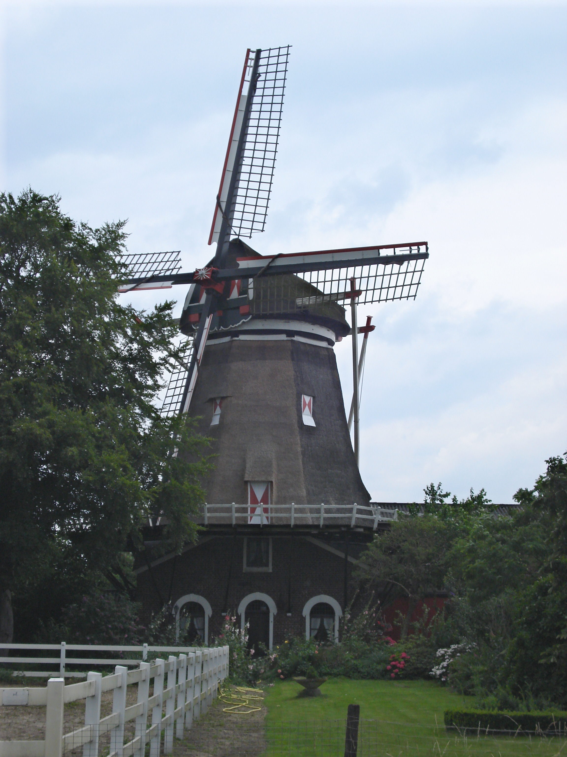 Katwijk, moulin octogonal à étage